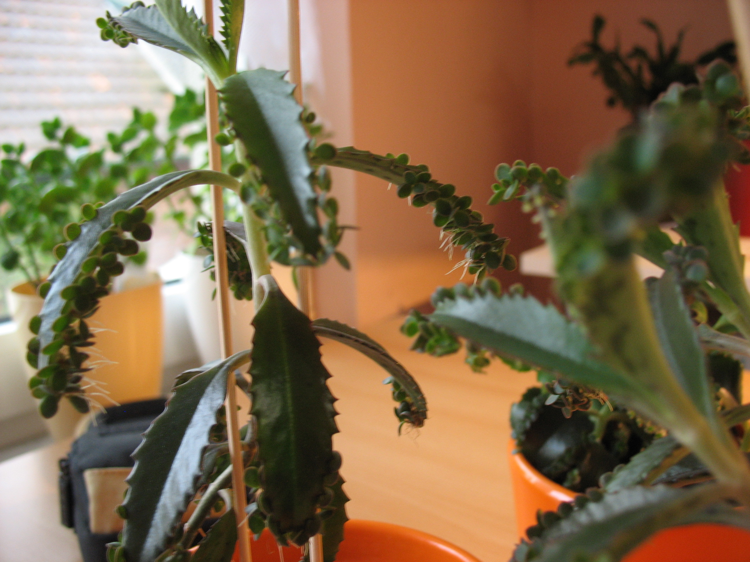 Kalanchoe daigremontiana. Siehe auch